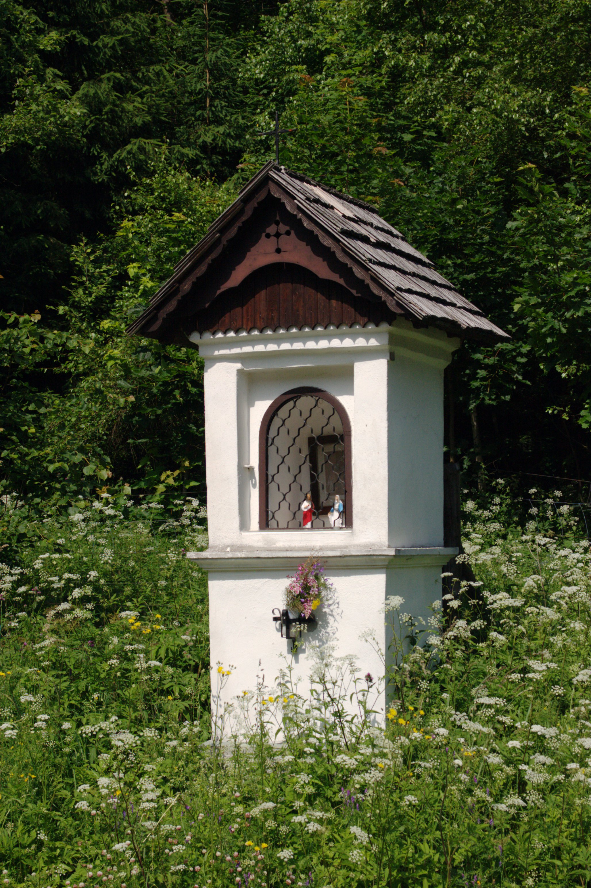 Boží muka - Nová Seninka - jihozápadní pohled